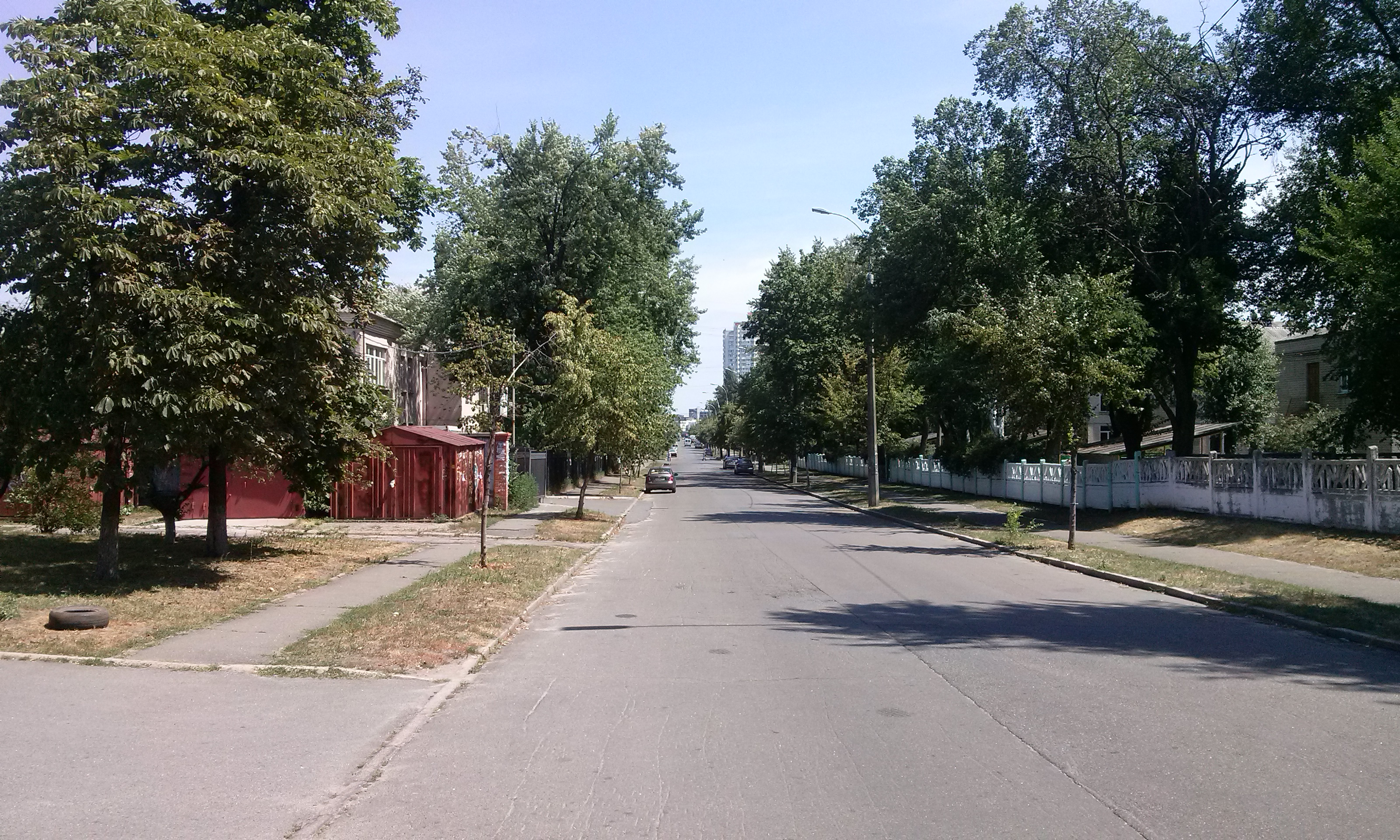 вулиця Сормовська